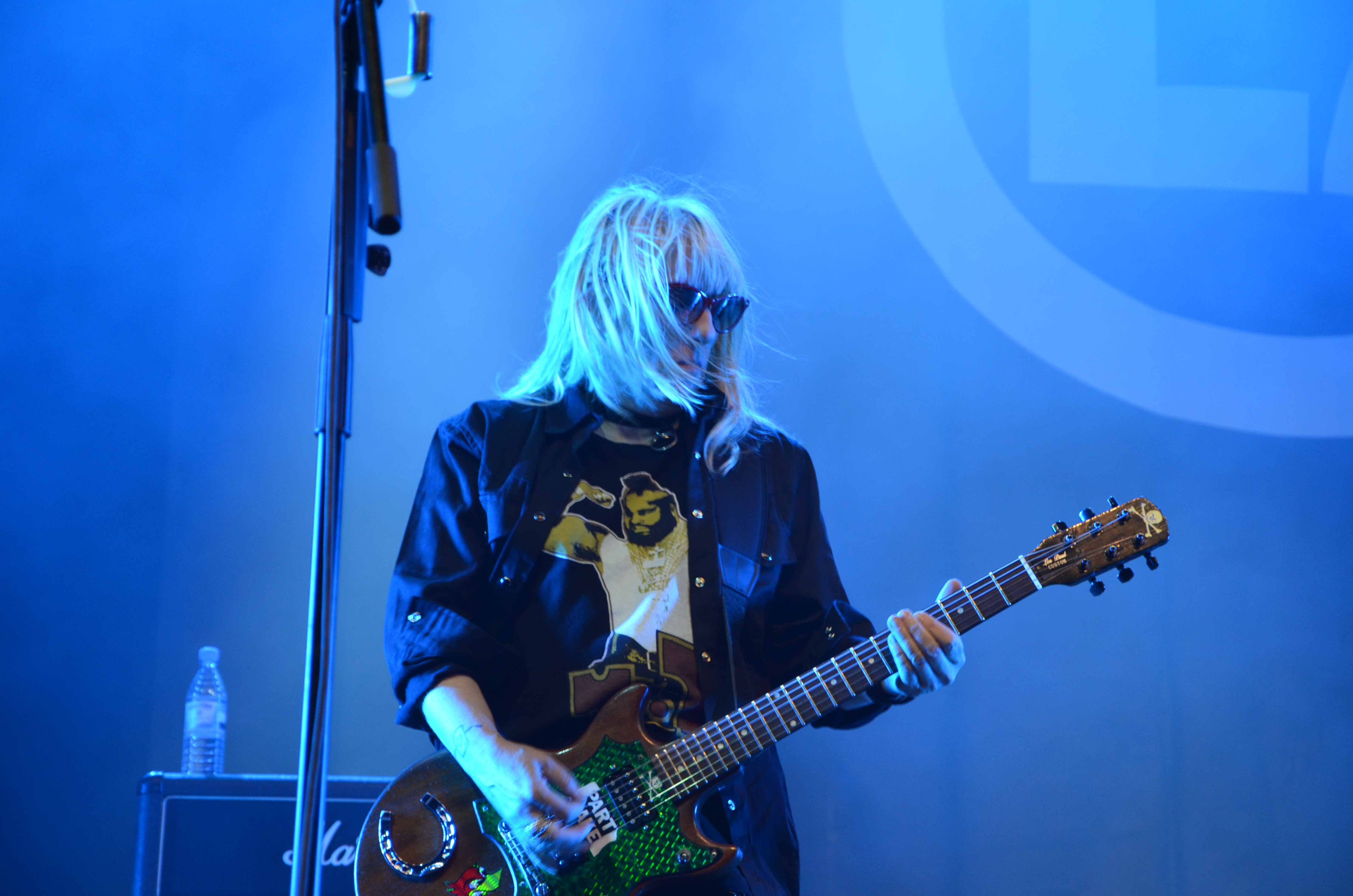 L7 spielen bei Rock am Ring 2015 in Mendig.